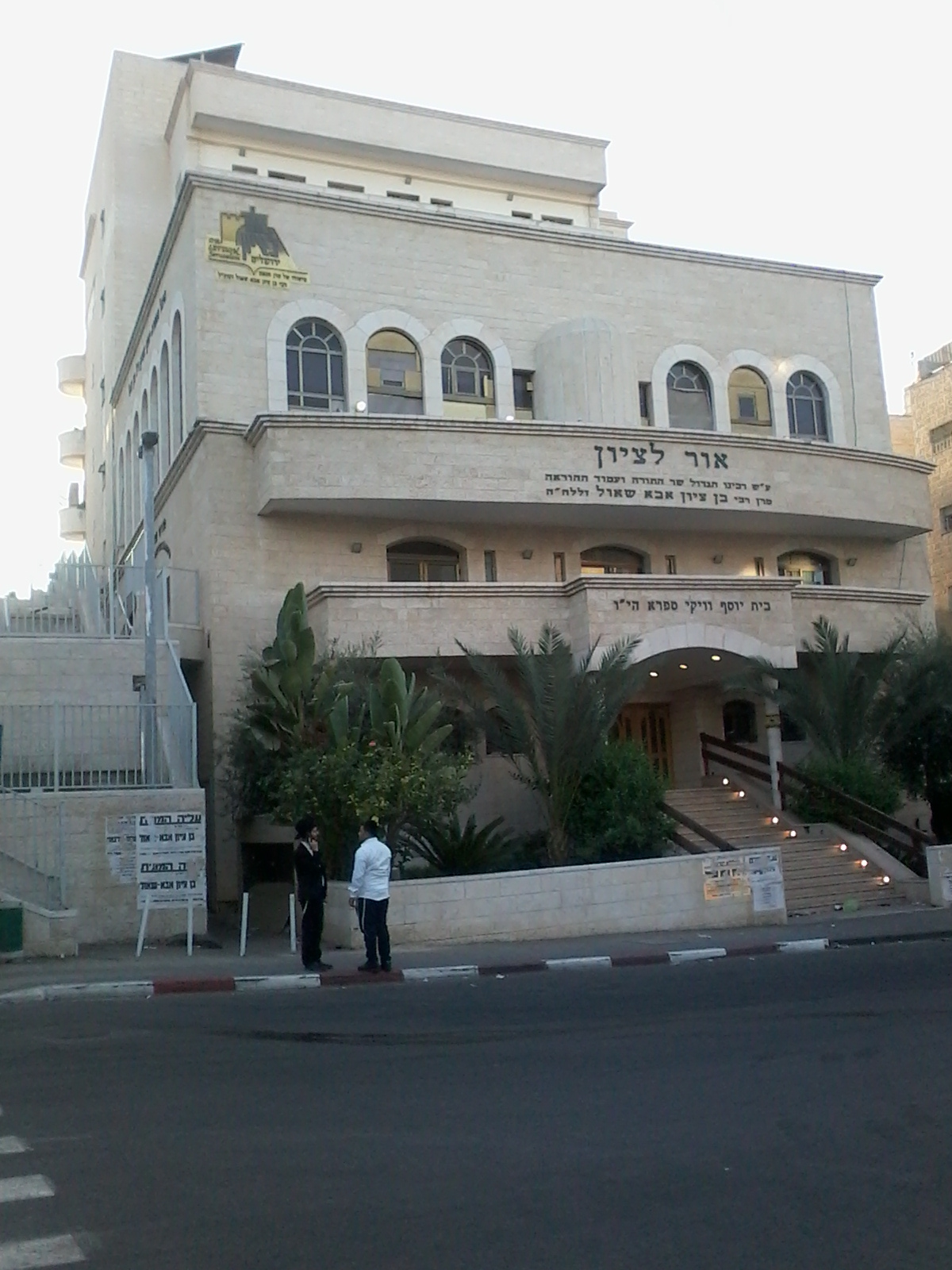 ישיבת 'אור לציון' (אוגוסט 2017)